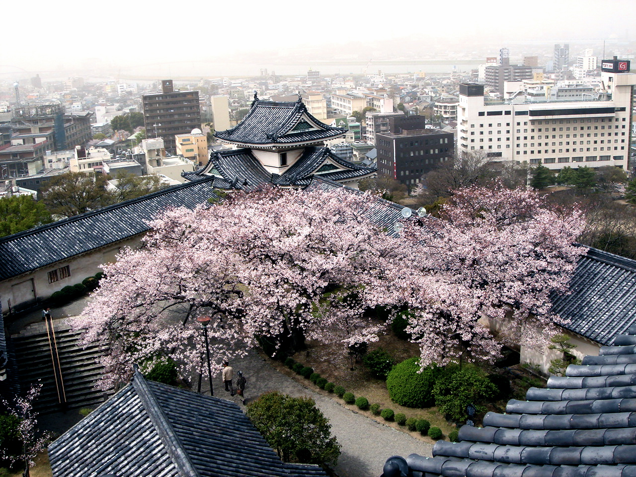 Skyline of Wakayama, Wakayama, viewed from the Wakayama Castle.